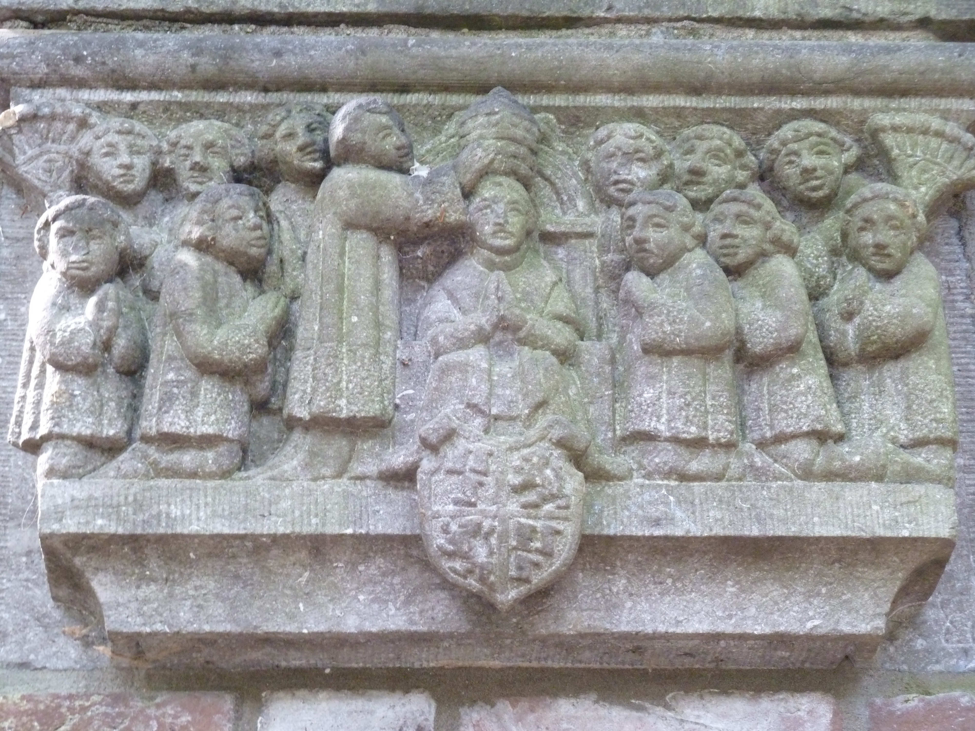 Straatlantaarnconsole thv Oudegracht 265, Utrecht, NL.